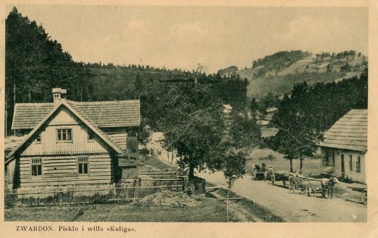 W Piekle obok szosy istniała niewielka piętrowa willa (własność p. Kuliga) posiadała 7 pokoi z 16 miejscami noclegowymi, w tym dwa pokoje opalane. Obok znajdowała się restauracja i masarnia tego samego właściciela .